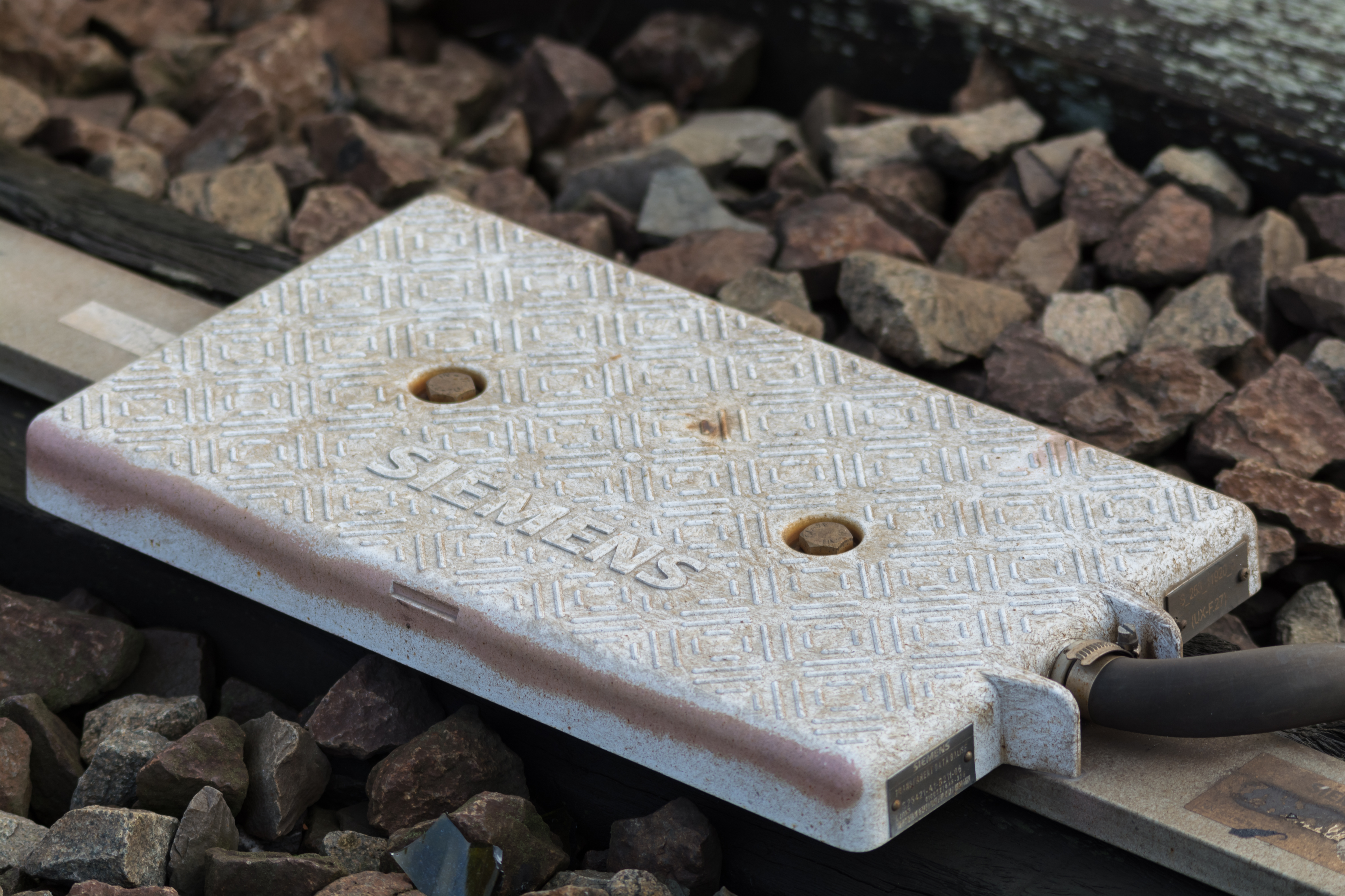 ETCS Systéme de contrôle des trains